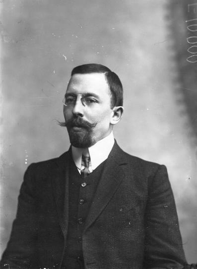 Депутат Третьей Государственной думы от Казанской губернии С.Н.Максудов.